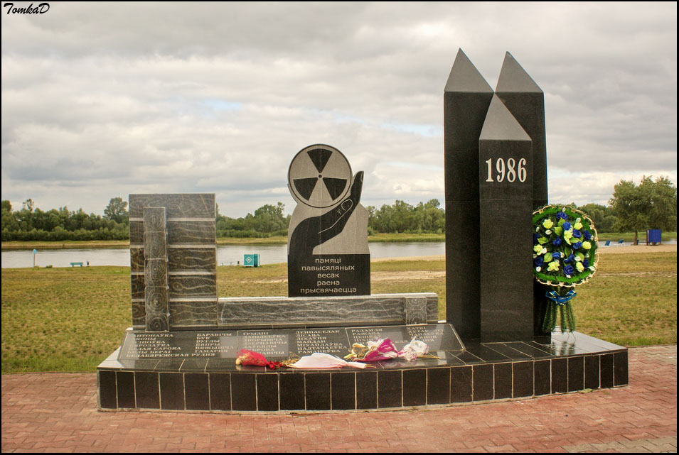 Нароўля. Помнік выселеным вёскам